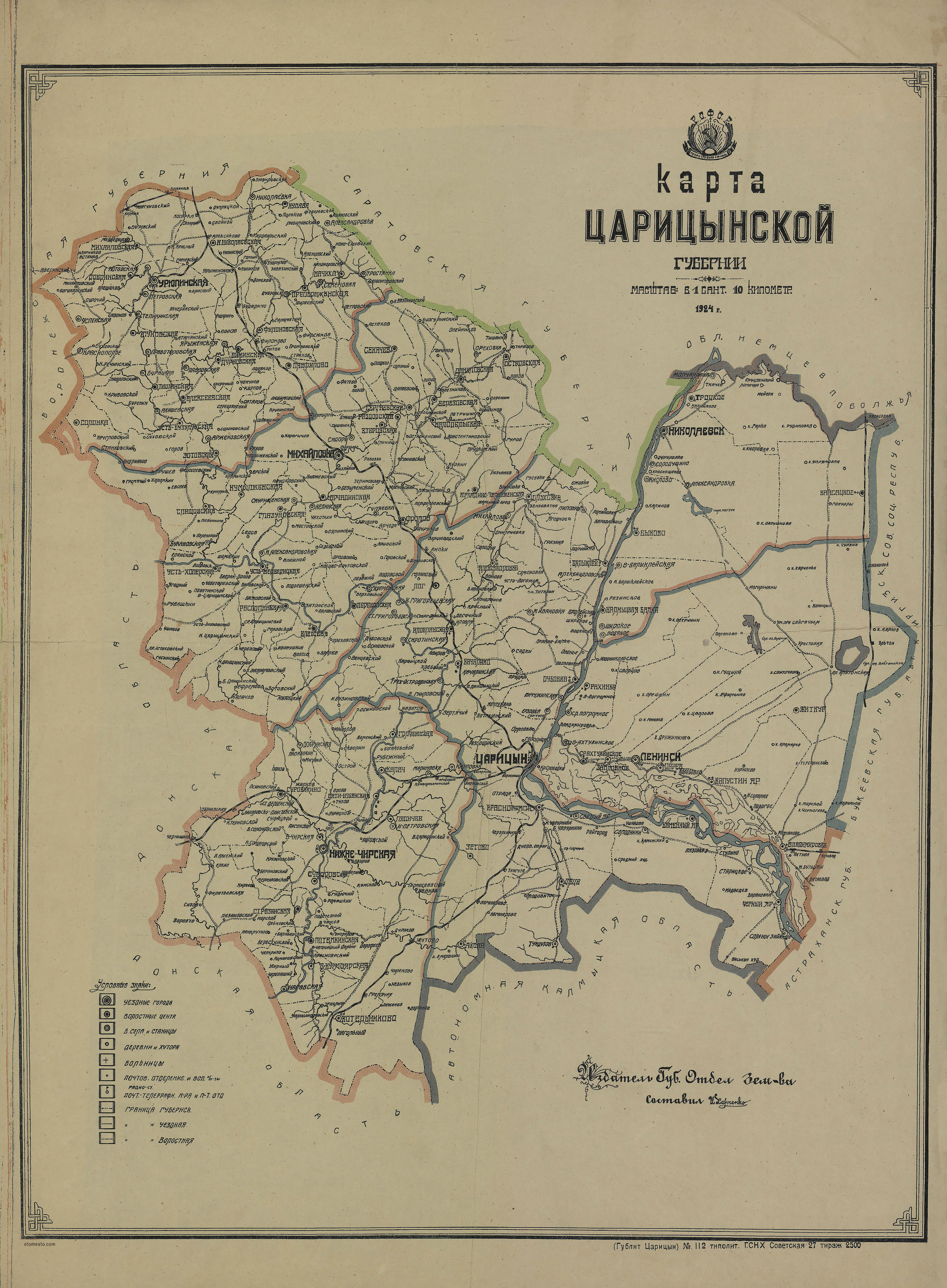 Карта Царицынской губернии 1924 год